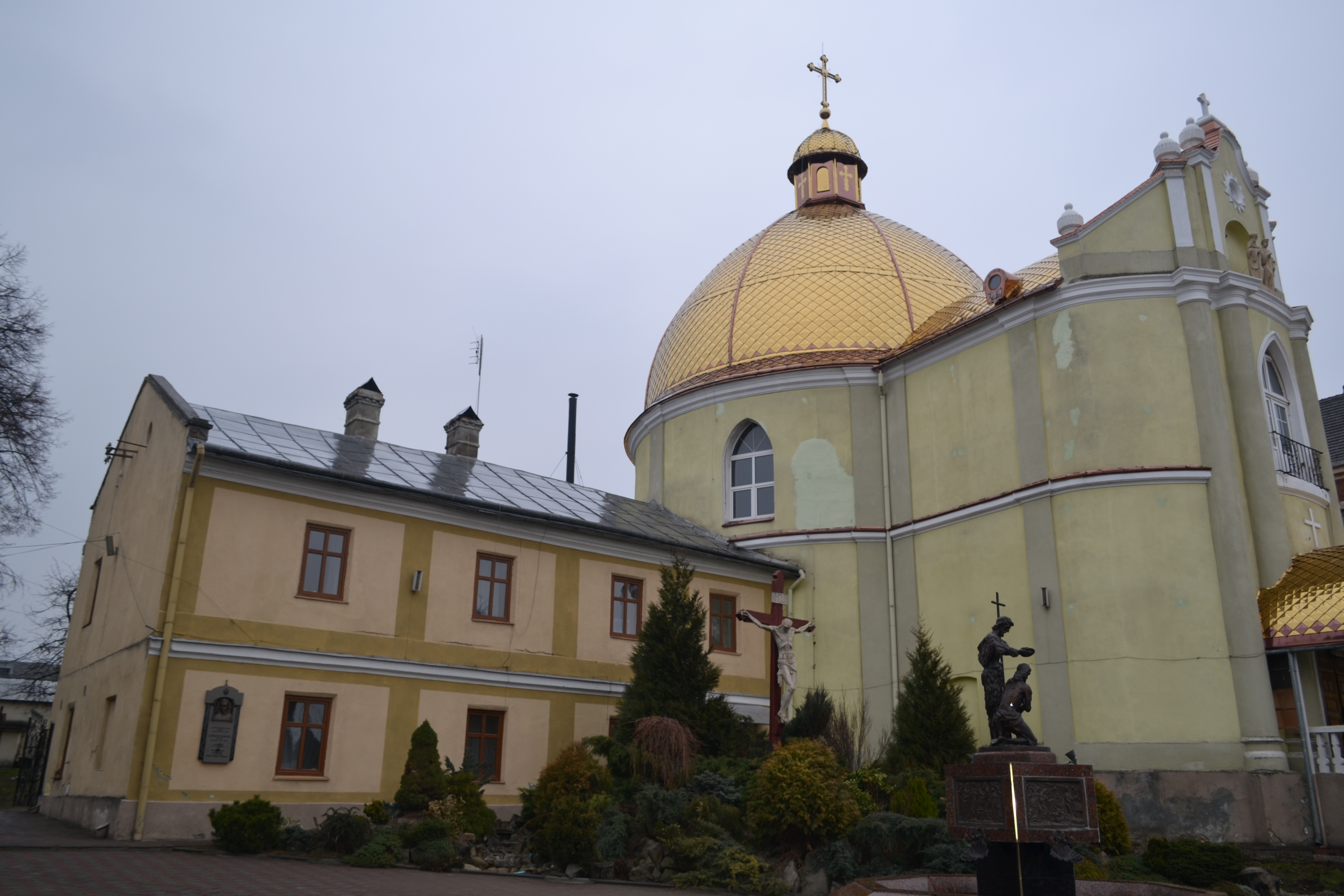 Церква Петра і Павла, Дрогобич, вул. Стрийська, 1